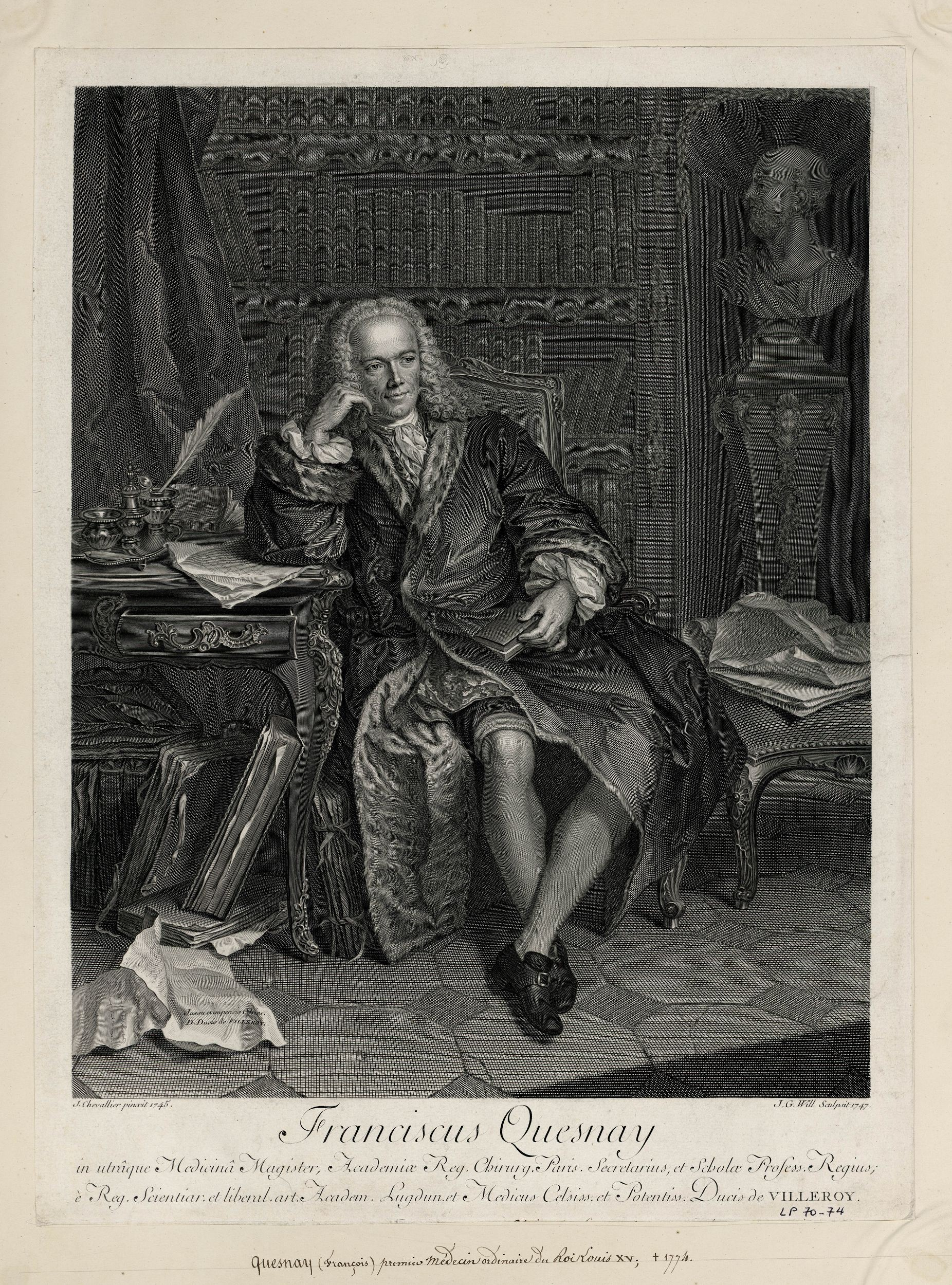 Portrait de François Quesnay réalisé par Johann-Georg Wille d'après une peinture de Jean Chevalier.